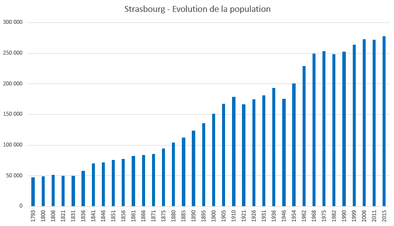 Graphique - Evolution de la population Strasbourgeoise de 1793 à 2015